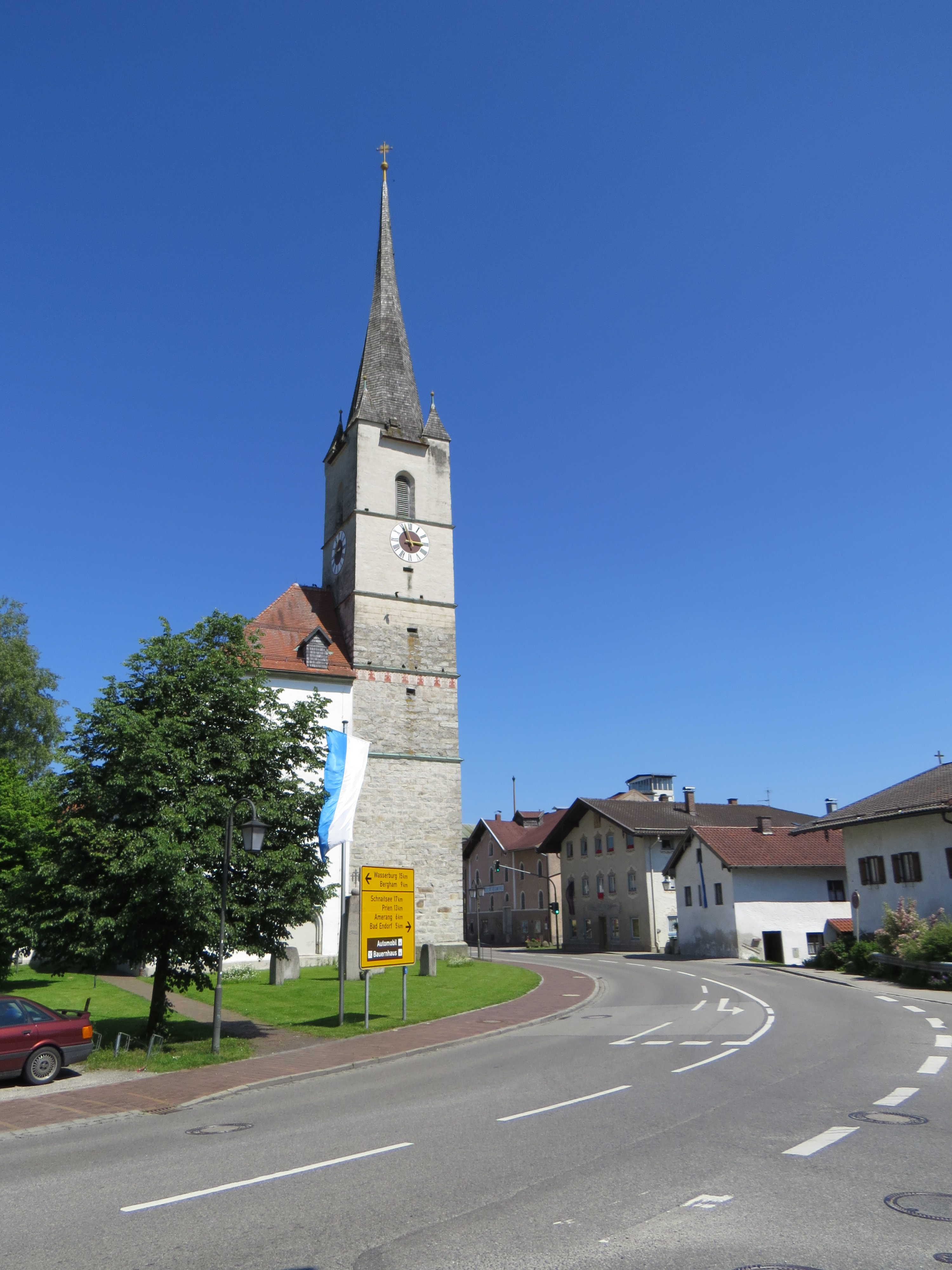 Kirche in Halfing